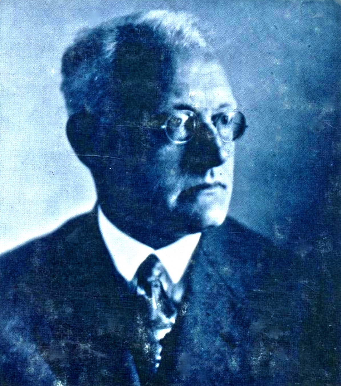 Herman Friedrich Schmalenbach (1885–1950), deutscher Sozialphilosoph